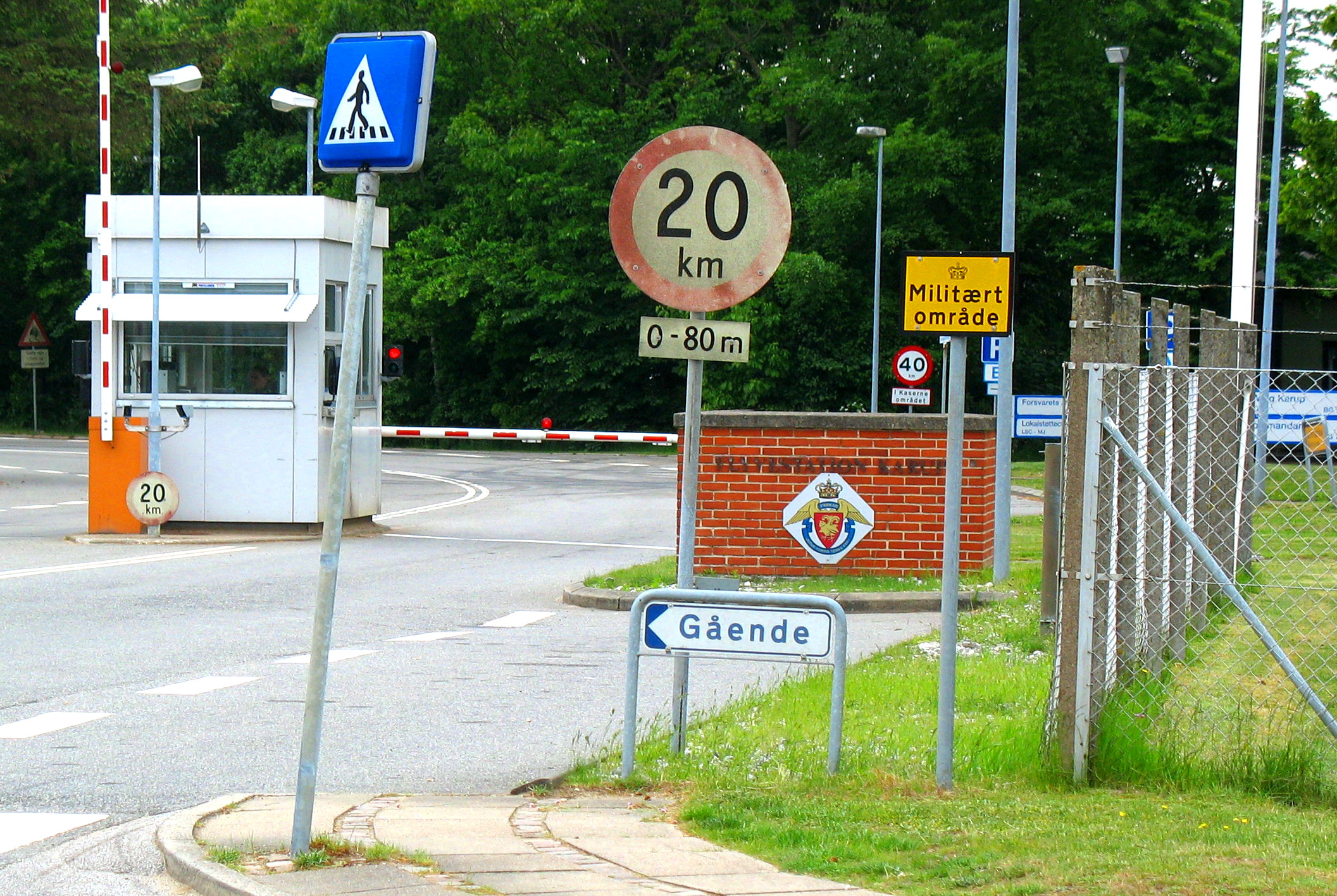 Indgangen ved Flyvestation Karup.